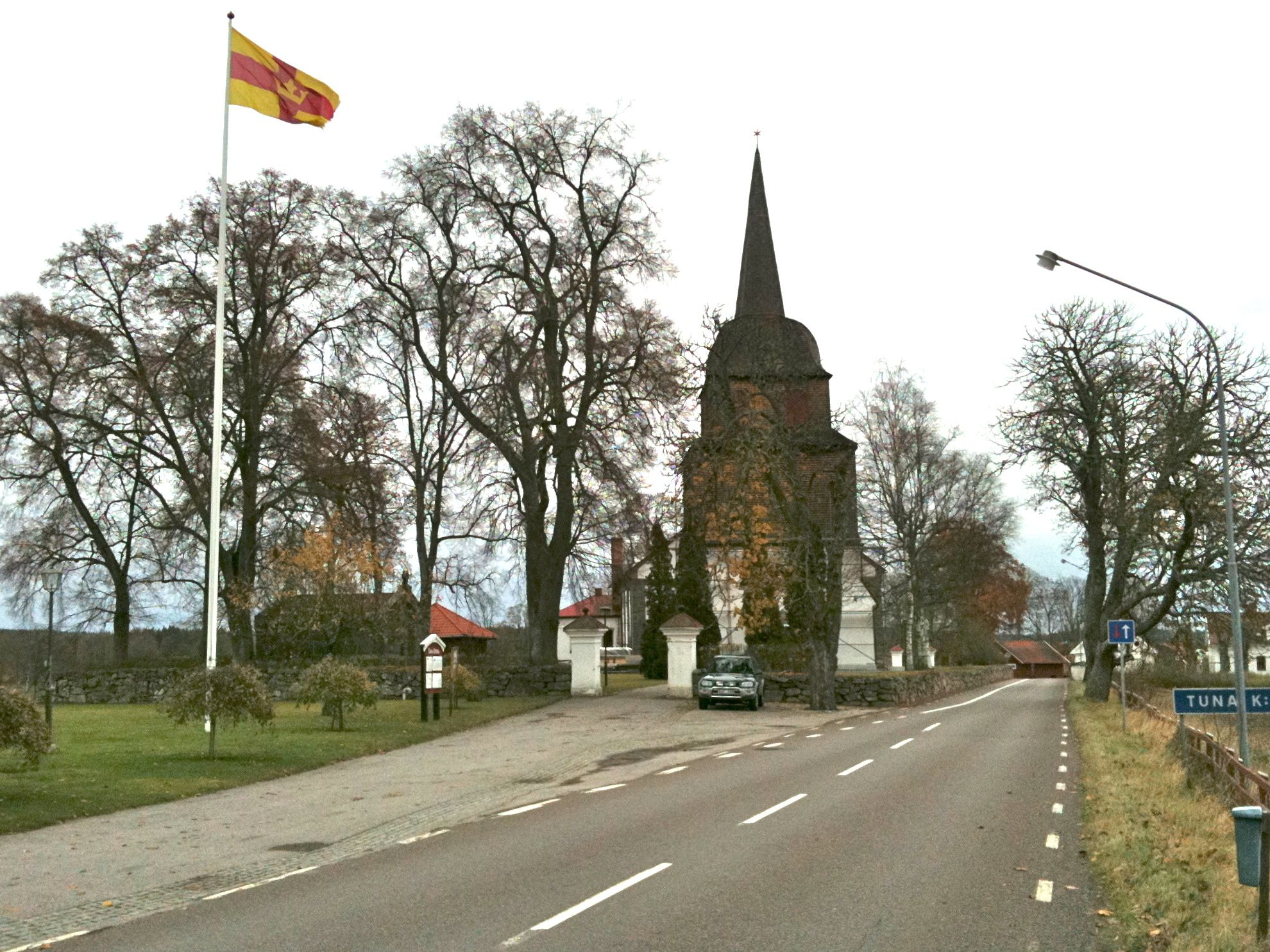 Tuna Kyrka